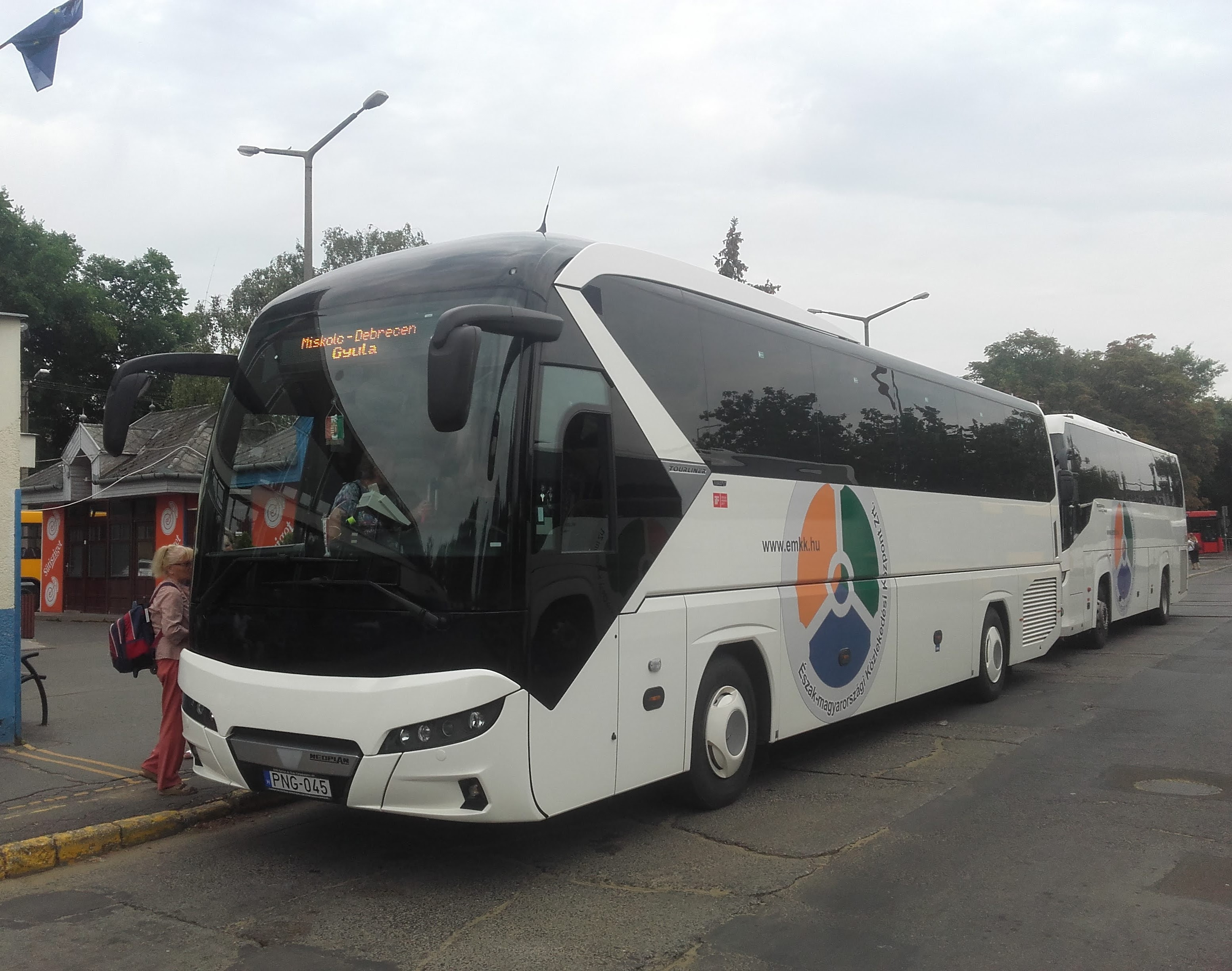 Az ÉMKK PNG-045 rendszámú Neoplan Tourliner típusú busza Debrecenben, a 1373-as országos járaton.